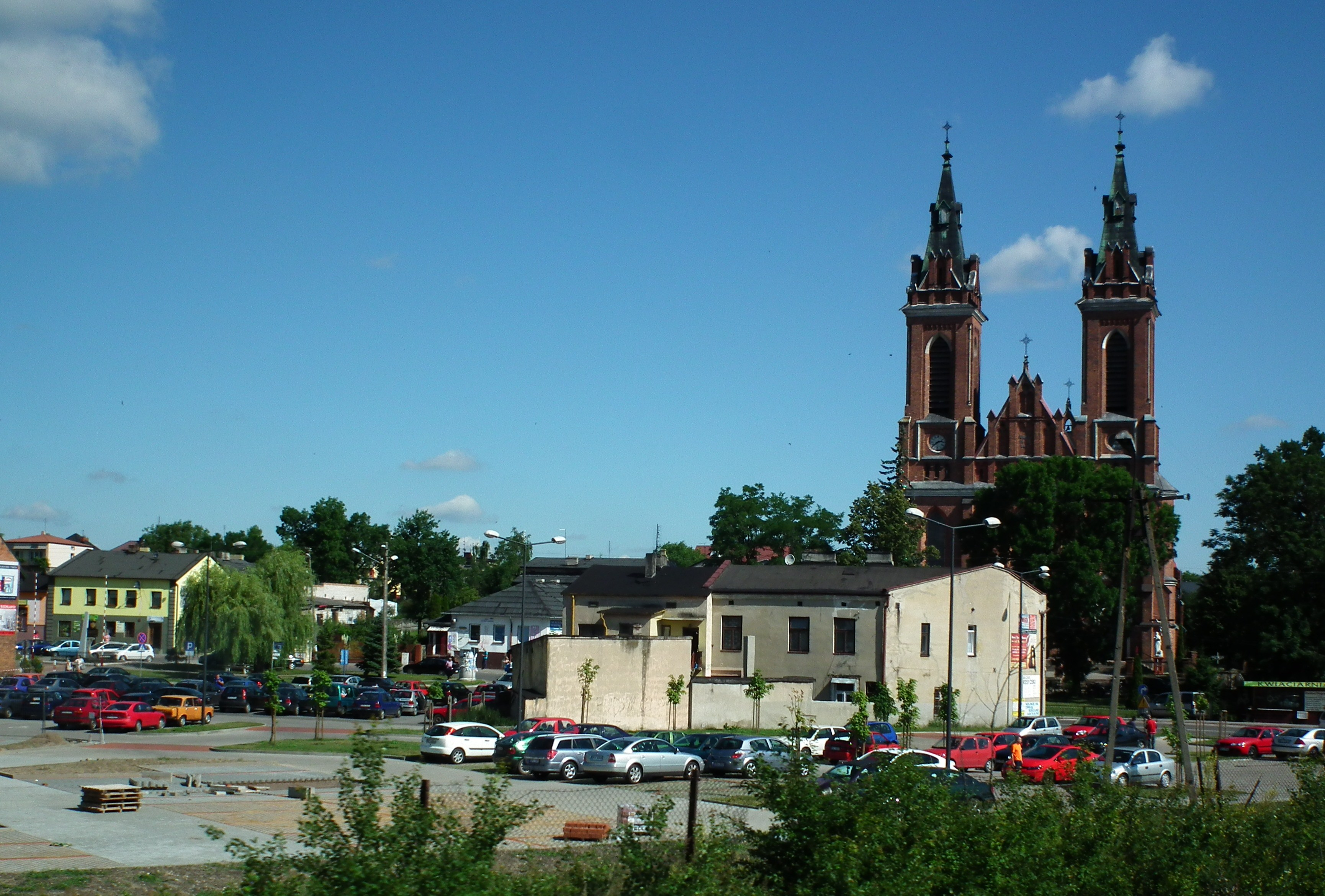 Panorama Gorzkowic.